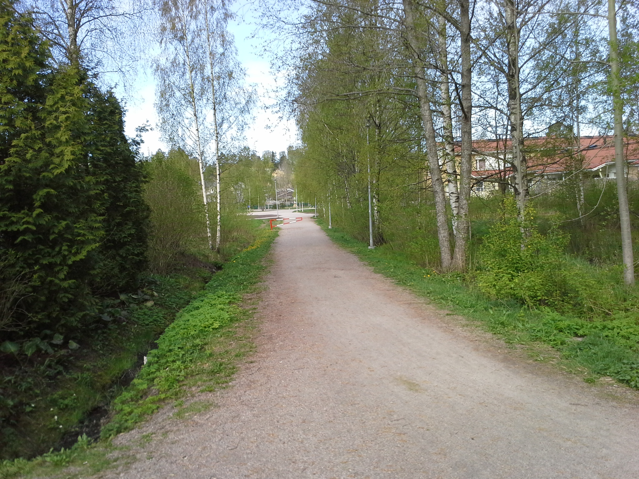 Turveradan penkalle rakennettu ulkoilutie yhdistää Inkoonkujan ja Kilonpurontien